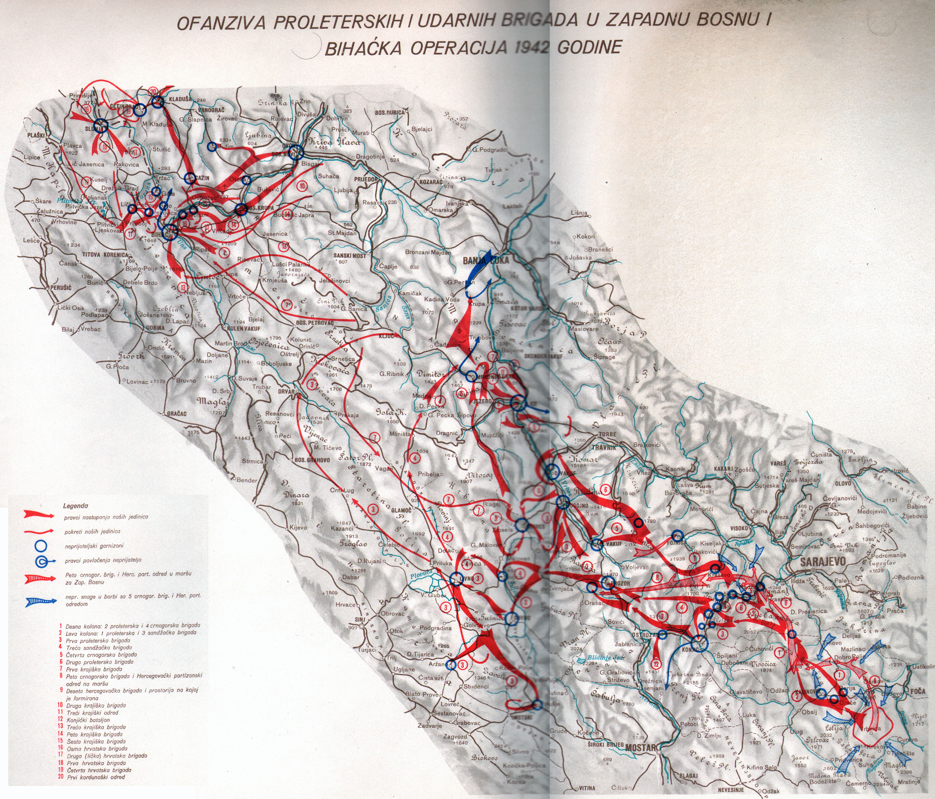 Srpskohrvatski / српскохрватски: Ofanziva proleterskih i udarnih brigada u zapadnu bosnu i Bihaćka operacija 1942 godine